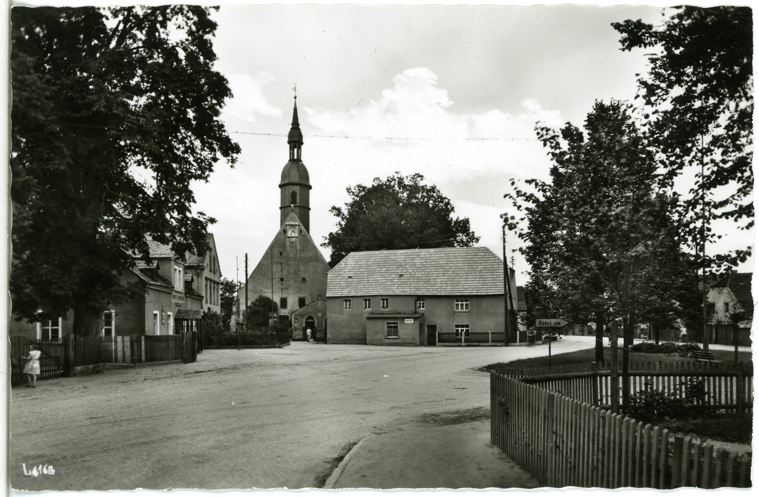 Frauenhain; Dorfplatz mit Kirche This postcard is from publisher Brück & Sohn in Meißen ( postcard has a unique number 29184 and is available in a higher resolution at the publisher. This images was uploaded in a cooperation project between Wikipedians and the publisher.